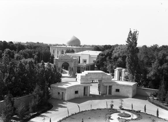 دورنمای كاخ مرمر